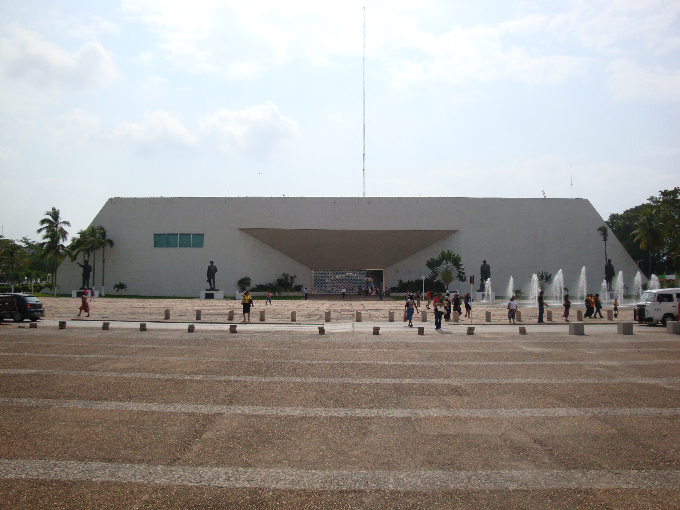 Moderno Palacio Municipal de Villahermosa, estado de Tabasco, México.